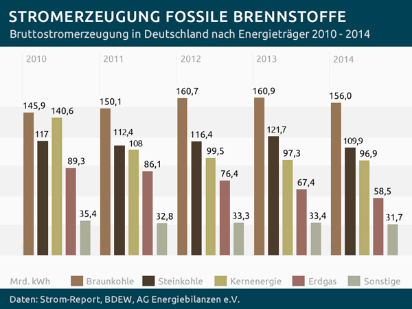 Stromerzeugung in Deutschland aus fossilen Brennstoffen 2010 – 2014